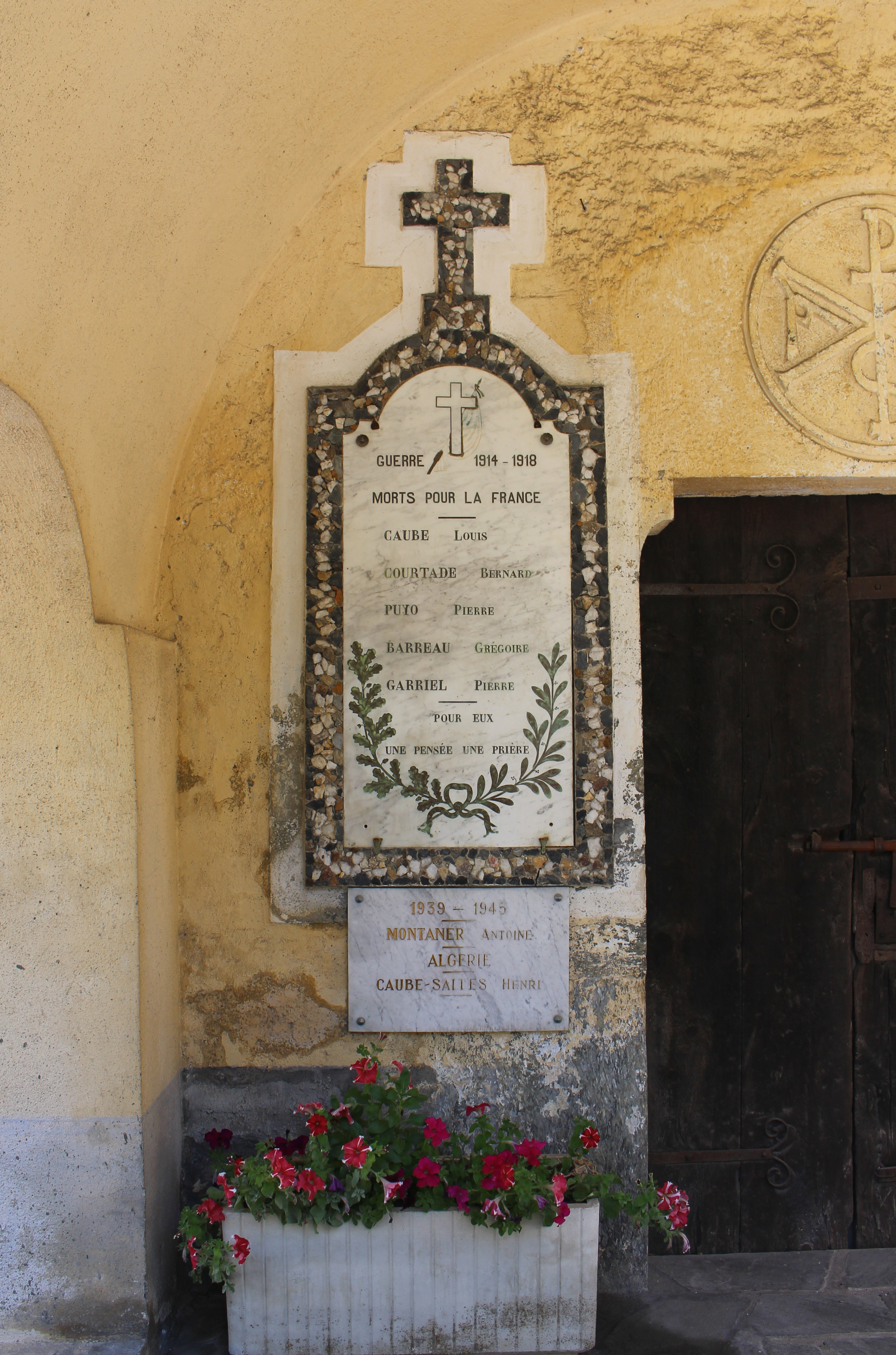 Monument aux morts de Sassis (Hautes-Pyrénées)